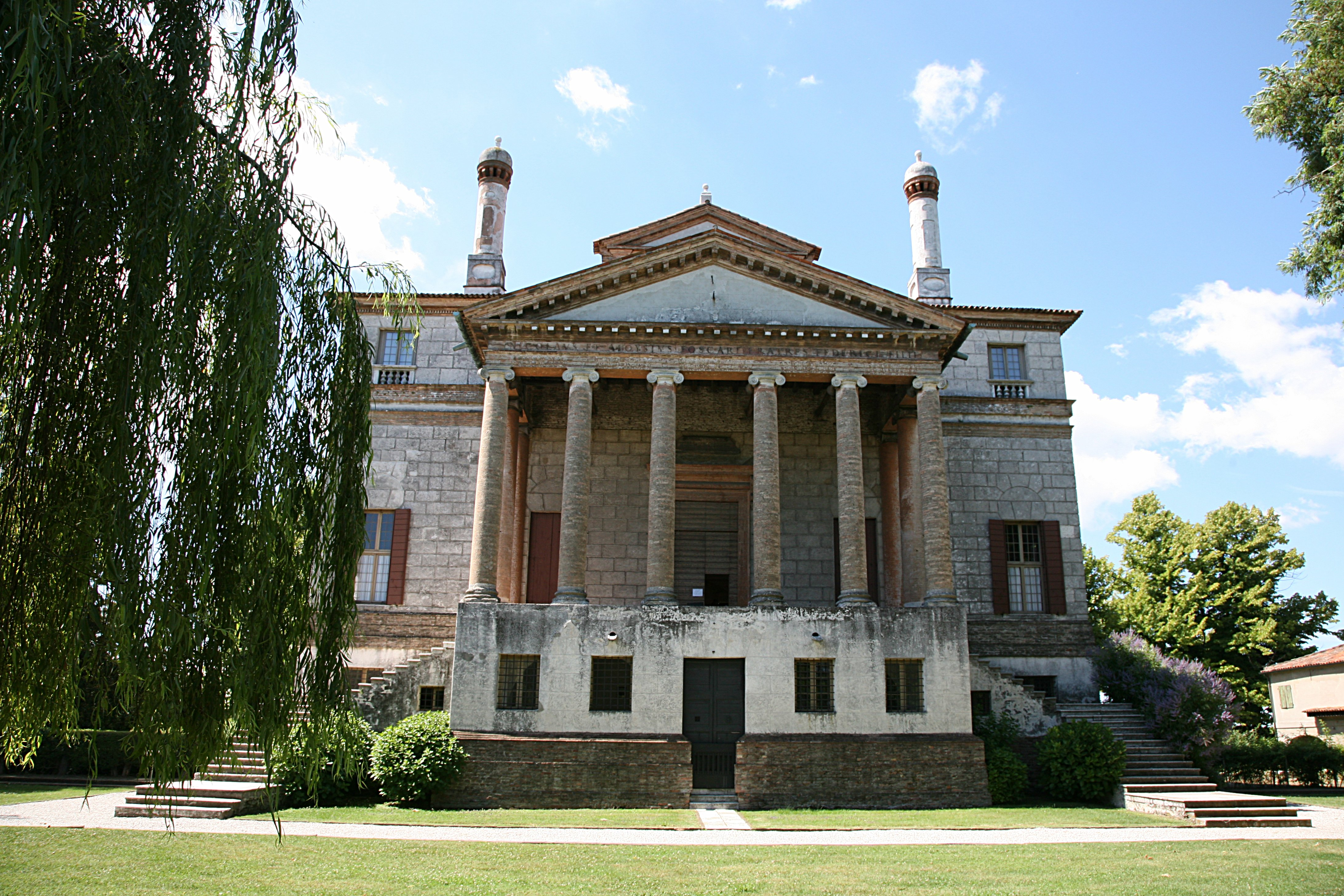 Villa near Venezia